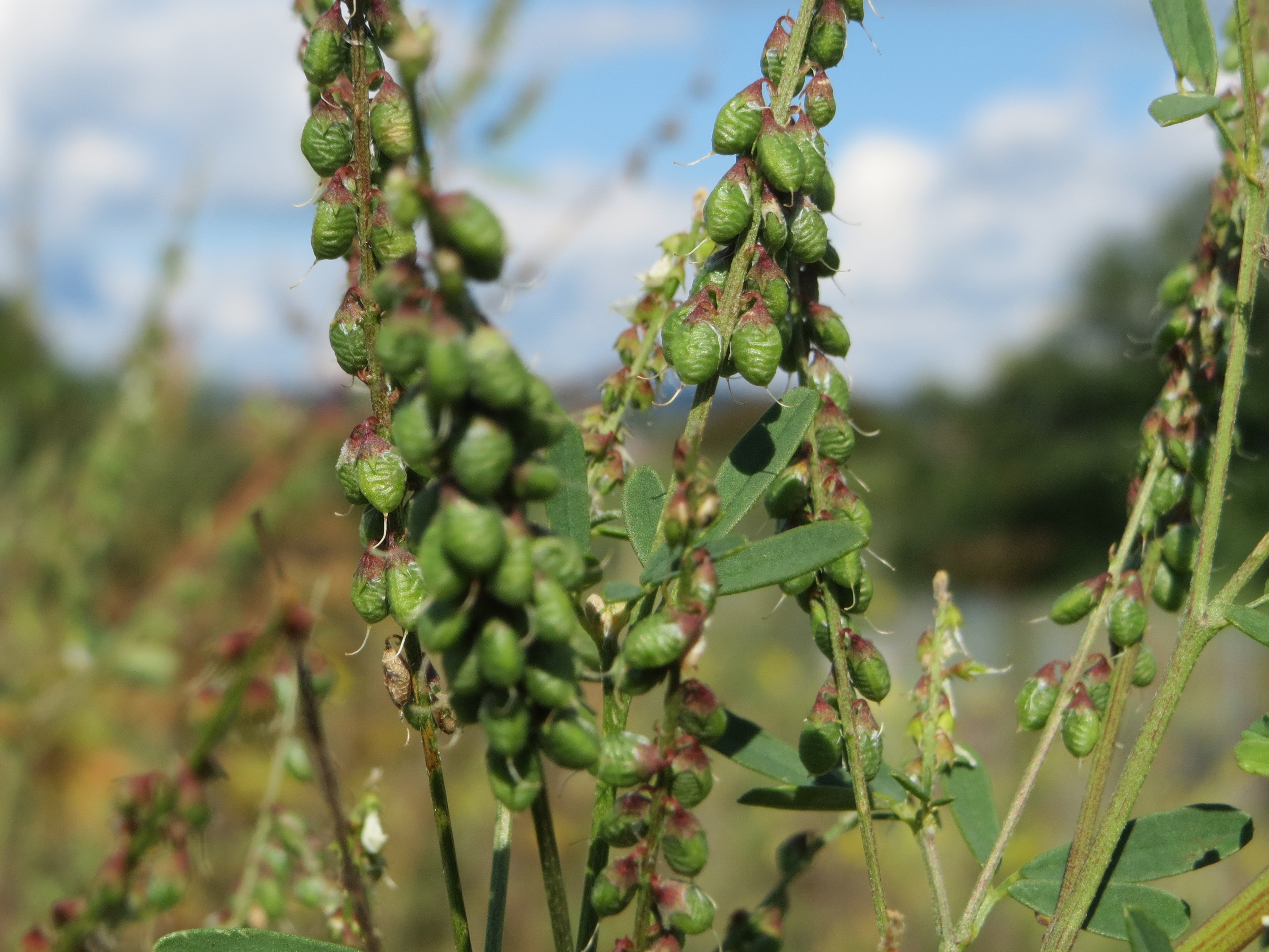 Gelber Steinklee (Melilotus officinalis) bei Walldorf